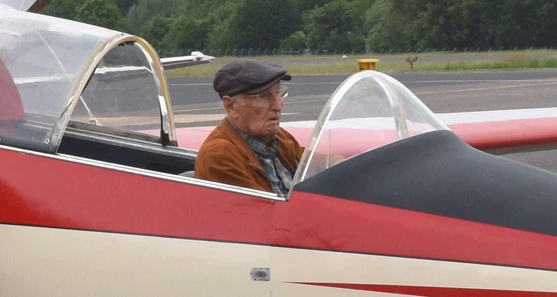 Konstrukteur Hanno Fischer in seiner RW-3, Ende Mai 2019 in Mönchengladbach (MGL) - Oldtimer Fly & Drive In - Hugo Junkers Hangar